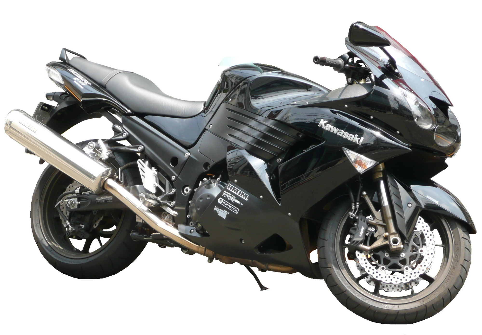 Kawasaki ZZR1400 2006